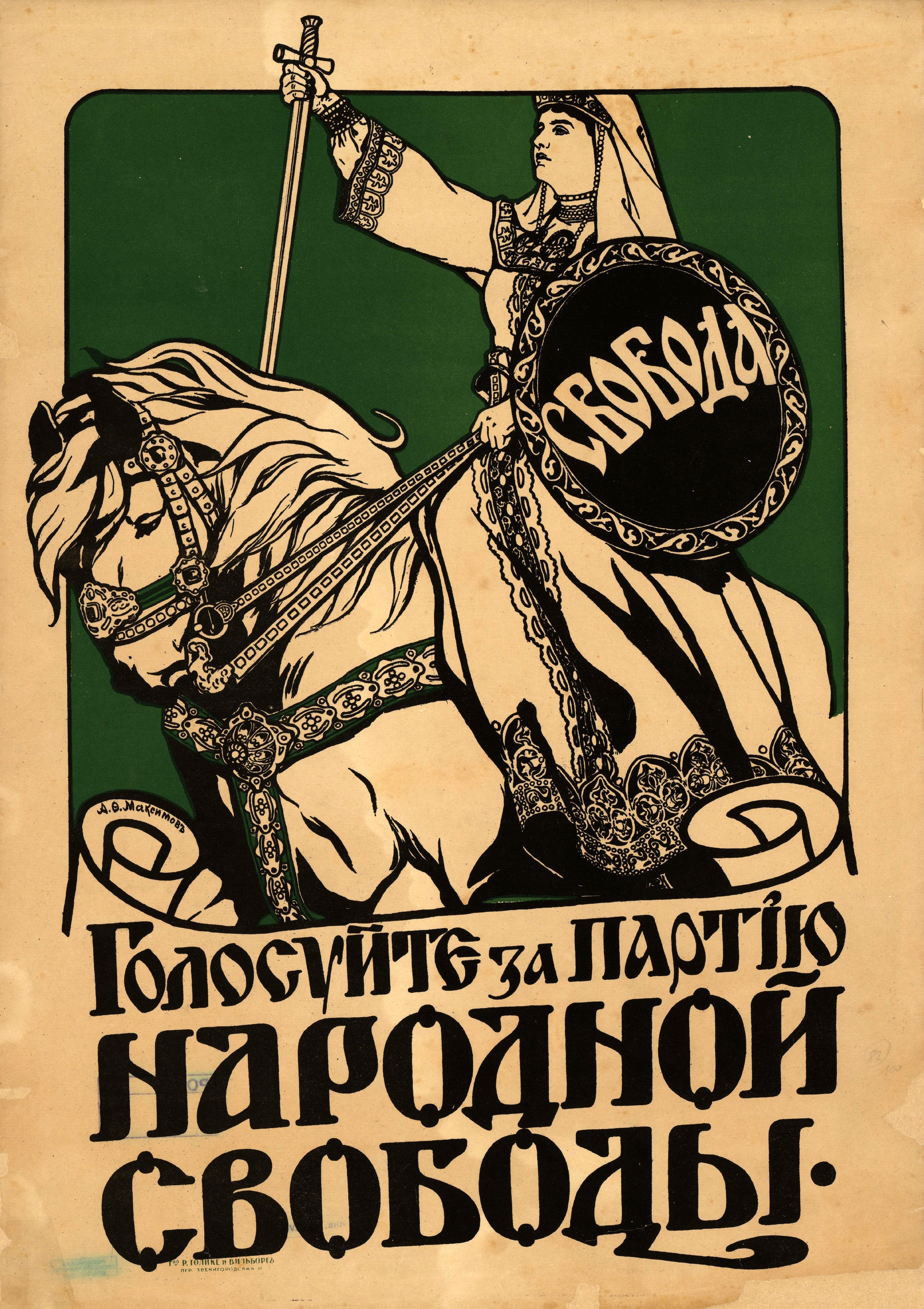 Плакат «Голосуйте за Партию Народной Свободы» для выборов в Учредительное собрание. Москва : Товарищество «Р. Голике и Вильборг», [1917]. Цветная литография, 1 лист, 71×49.5 см